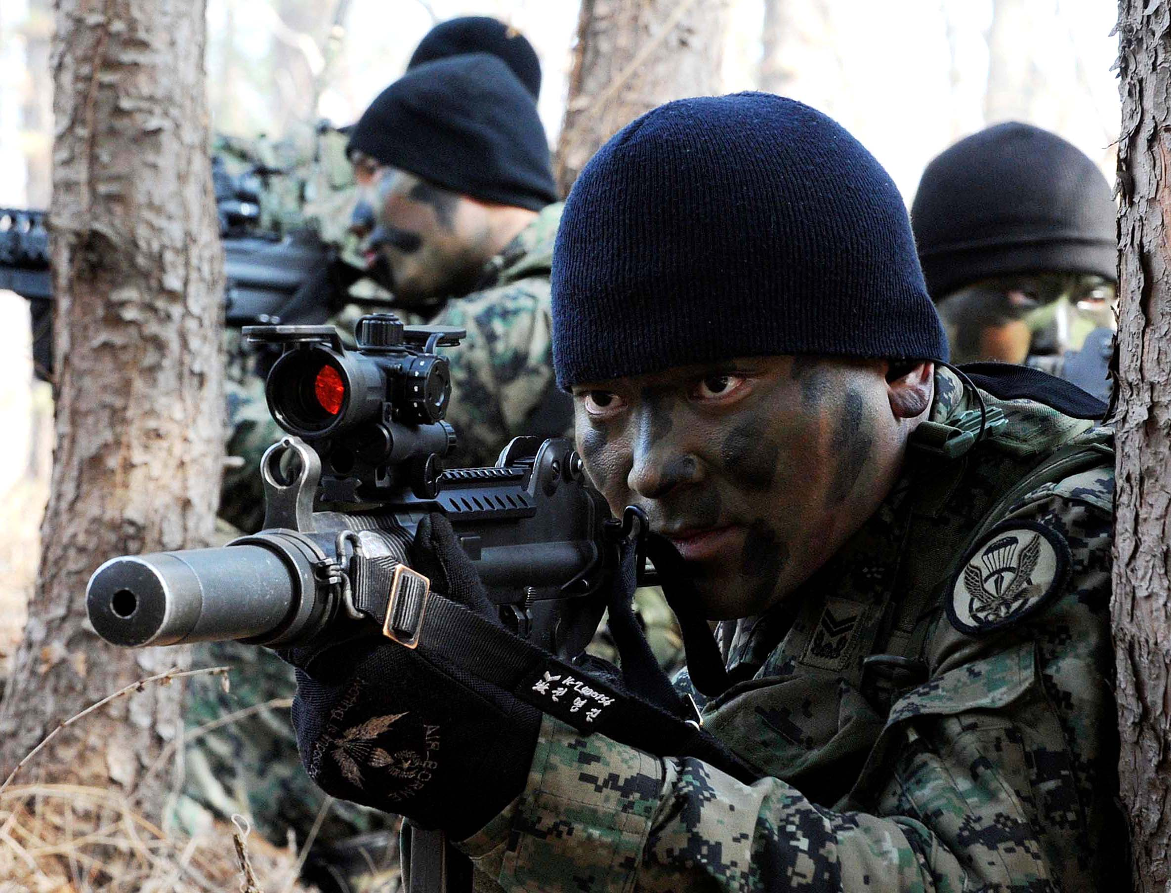 17일 육군특수전사령부 3공수특전여단 장병들이 검단산 일대에서 탐색격멸훈련을 펼치고 있다. 중대장이 조장들에게 하달한 명령에 따라 장병들이 새로 보급된 개인화기 주야 조준경을 이용해 가상의 적을 추적하고 있다. 촬영 - 김태형 기자